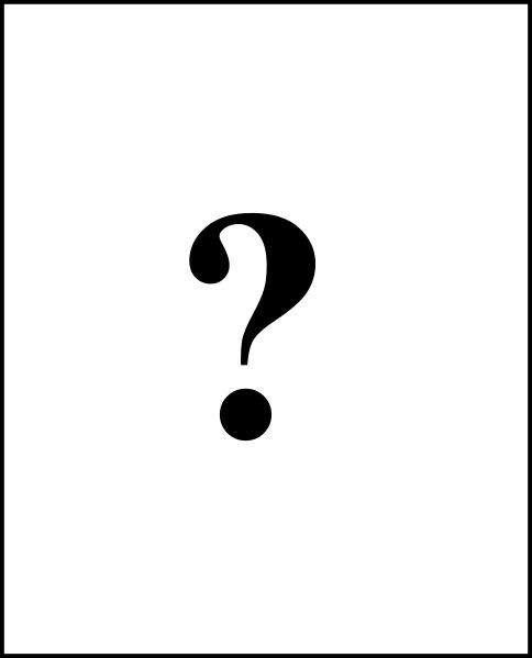 Imagine necunoscută